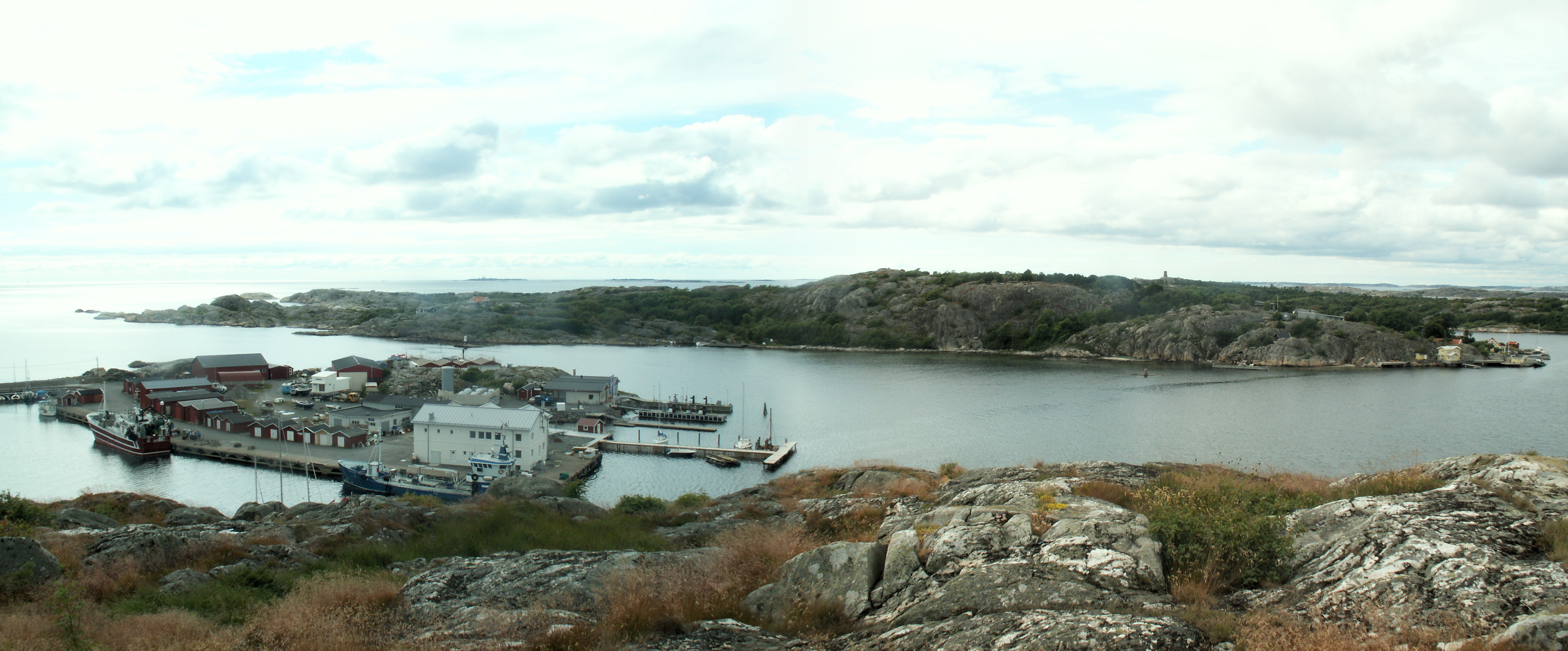 Vargö (panorama).